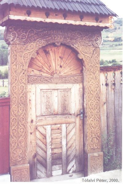 Székelykapu Korondon (Erdély)